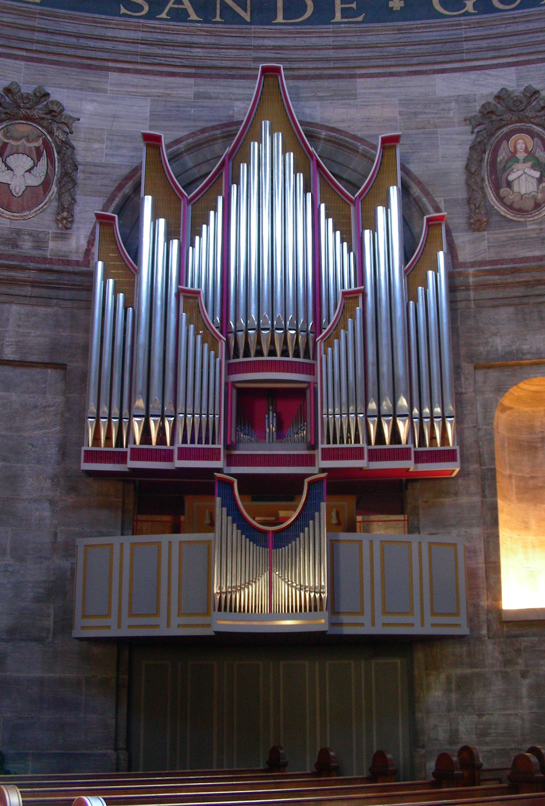 Marmorkirken, Copenhagen, Denmark. New organ.